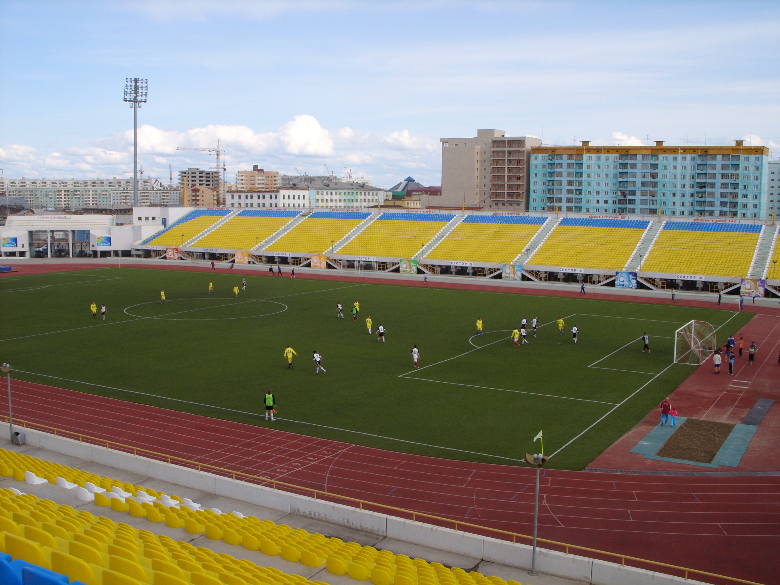 Снимок 2007 г.